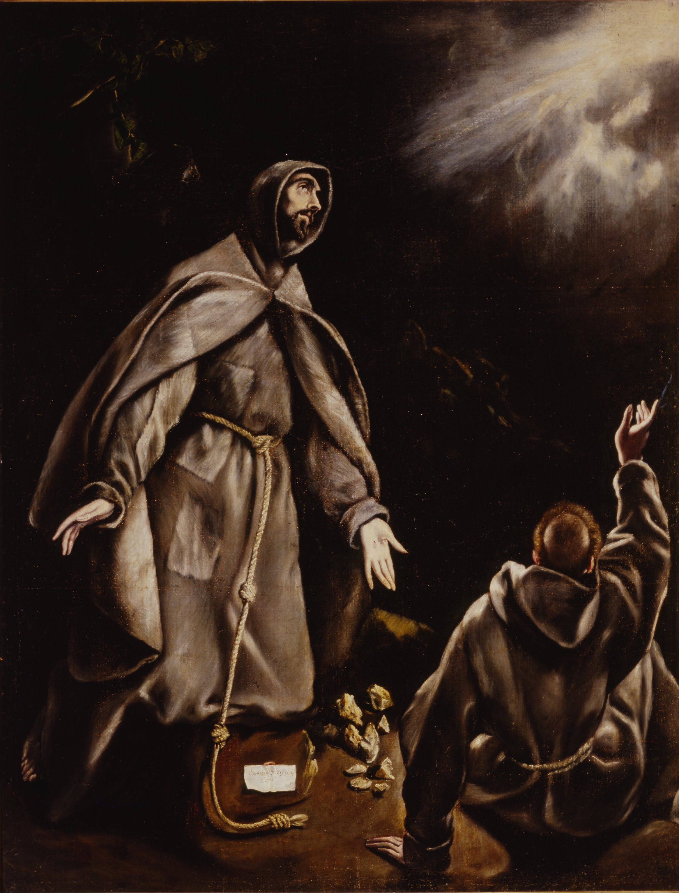 La obra representa a San Francisco de Asís, fundador de la Orden de los franciscanos, en actitud extática y en compañía de otro monje.